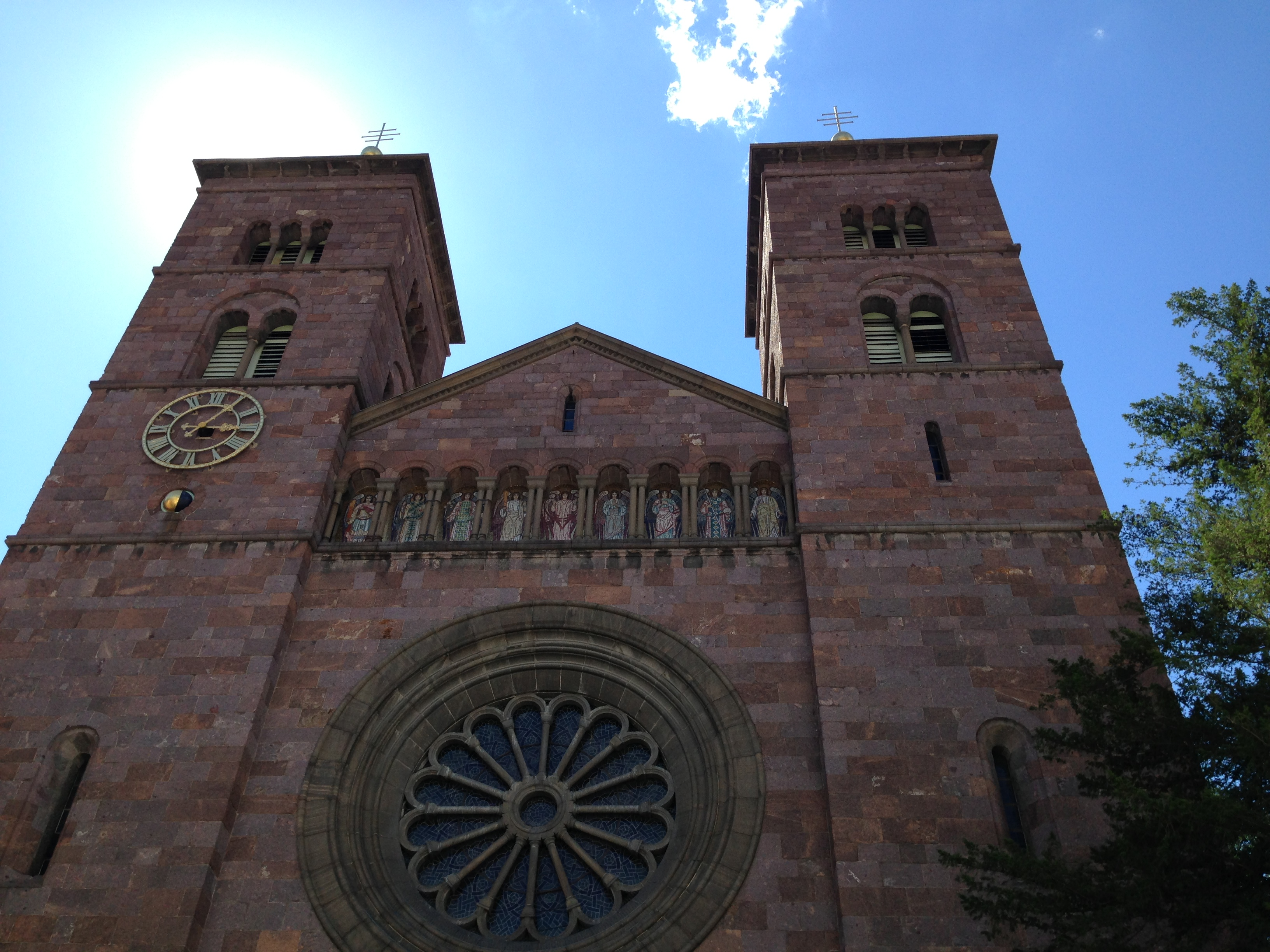 Herz-Jesu-Kirche in Bozen - Fassade